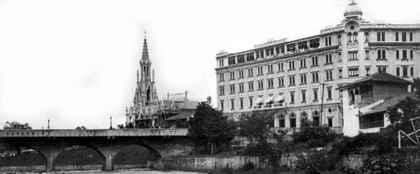 El puente ortiz y la ermita